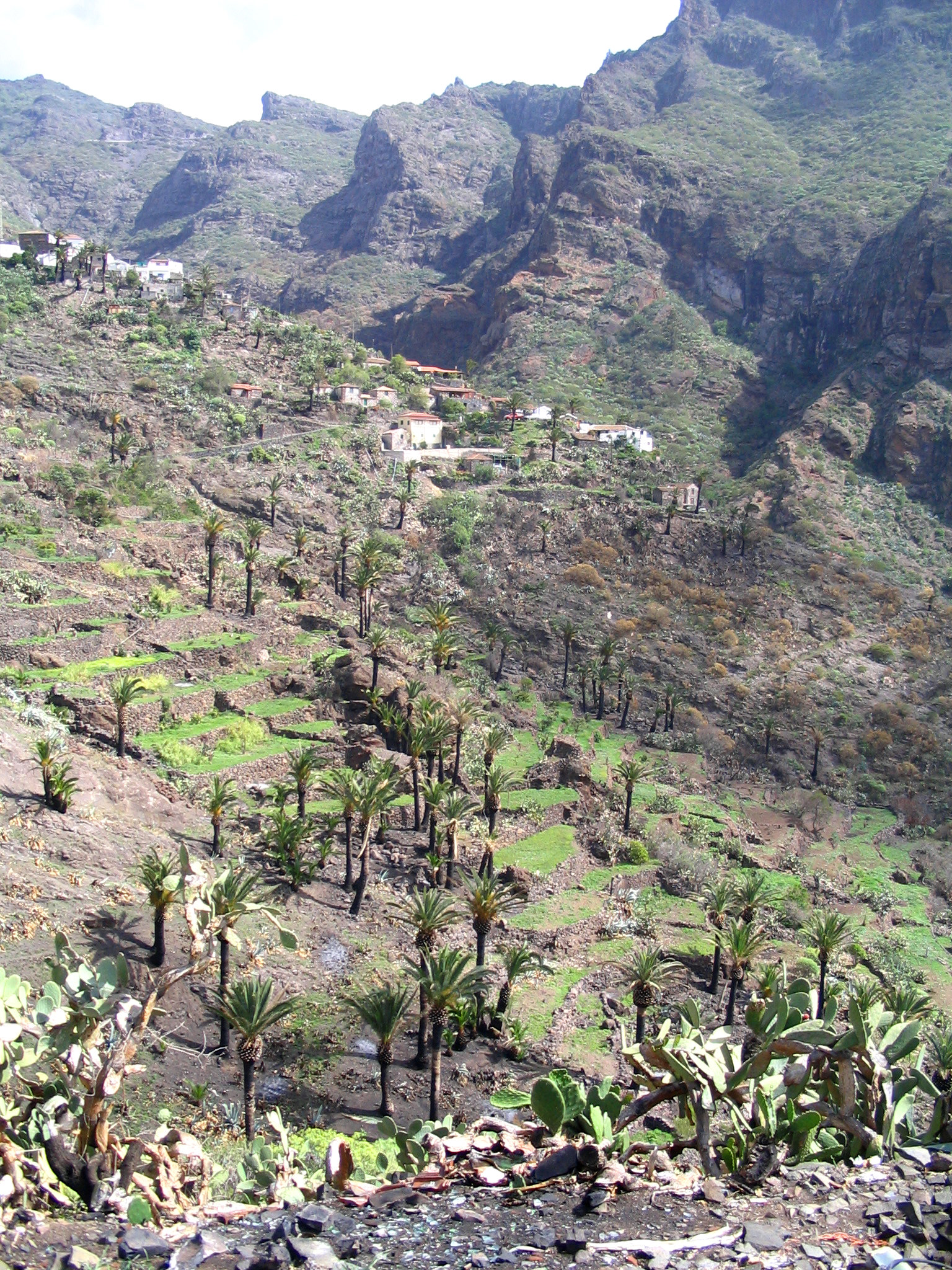 Restitution du couvert végétal après l'incendie de juillet 2007, Masca, Tenerife, Canaries.